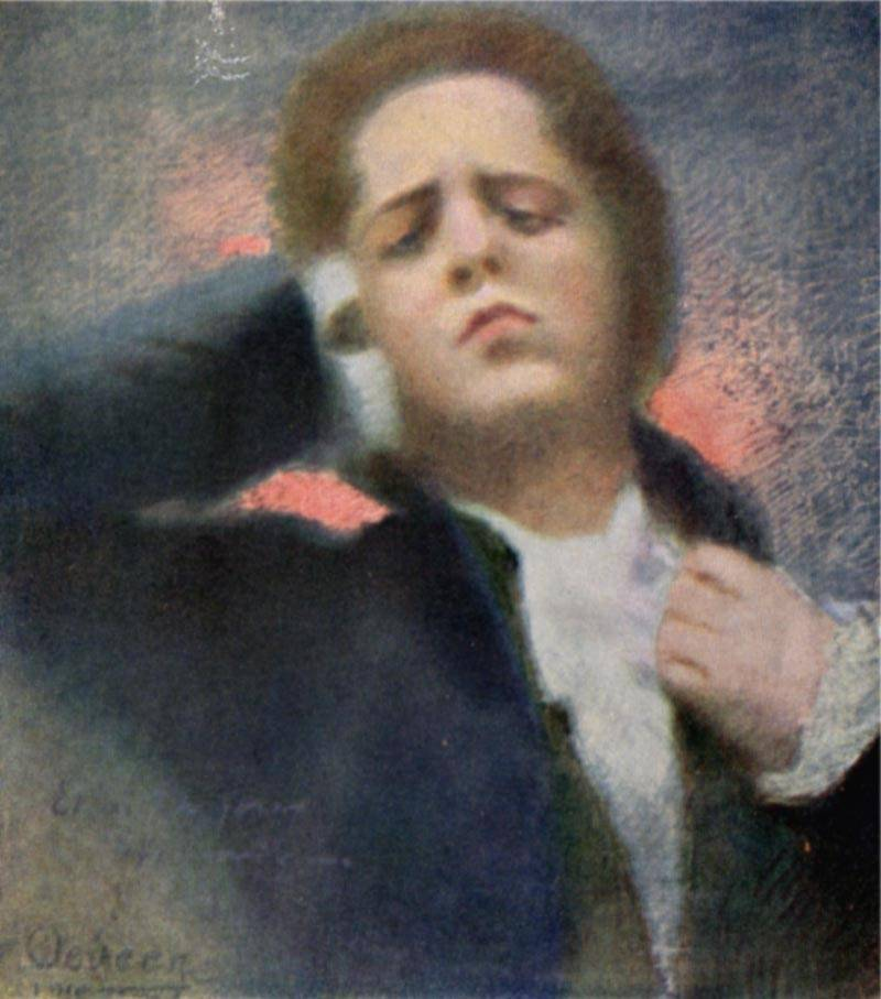 Л. В. Собинов в роли Вертера ("Вертер" Ж. Массне). Портрет работы худ. Эберга, 1911